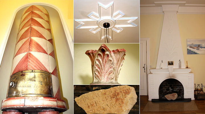 Details aus dem Inneren der Villa Hahn in Chemnitz, Händelstraße 9; erbaut 1923 von Architekt Eugen Weber, unter Denkmalschutz; Kachelofen, stuckierte Decke, Kamin u. a.